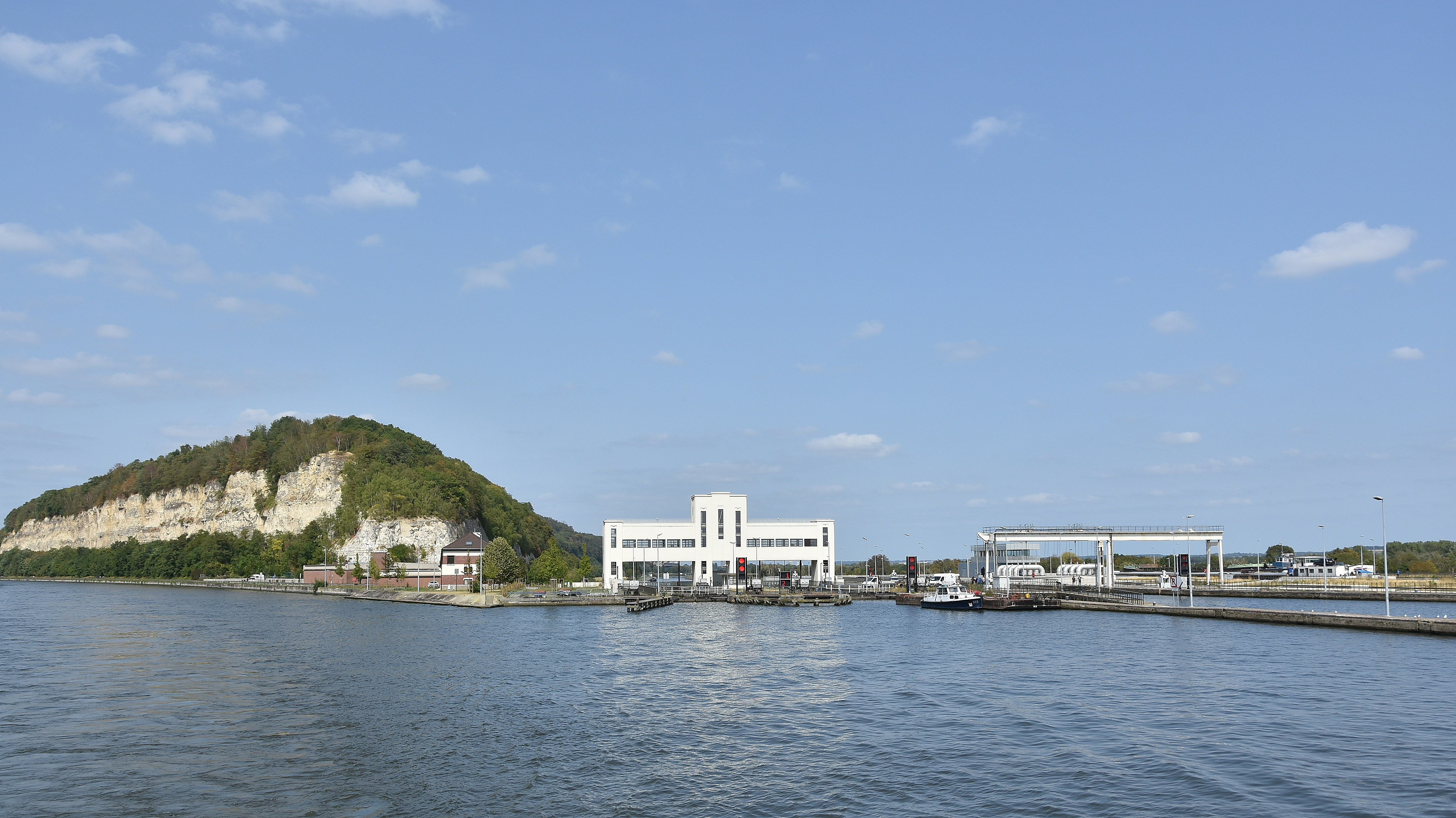 Albertkanaal en de stop van Ternaaien 28-08-2018 14-19-23 This photo of immovable heritage has been taken in the Walloon Region